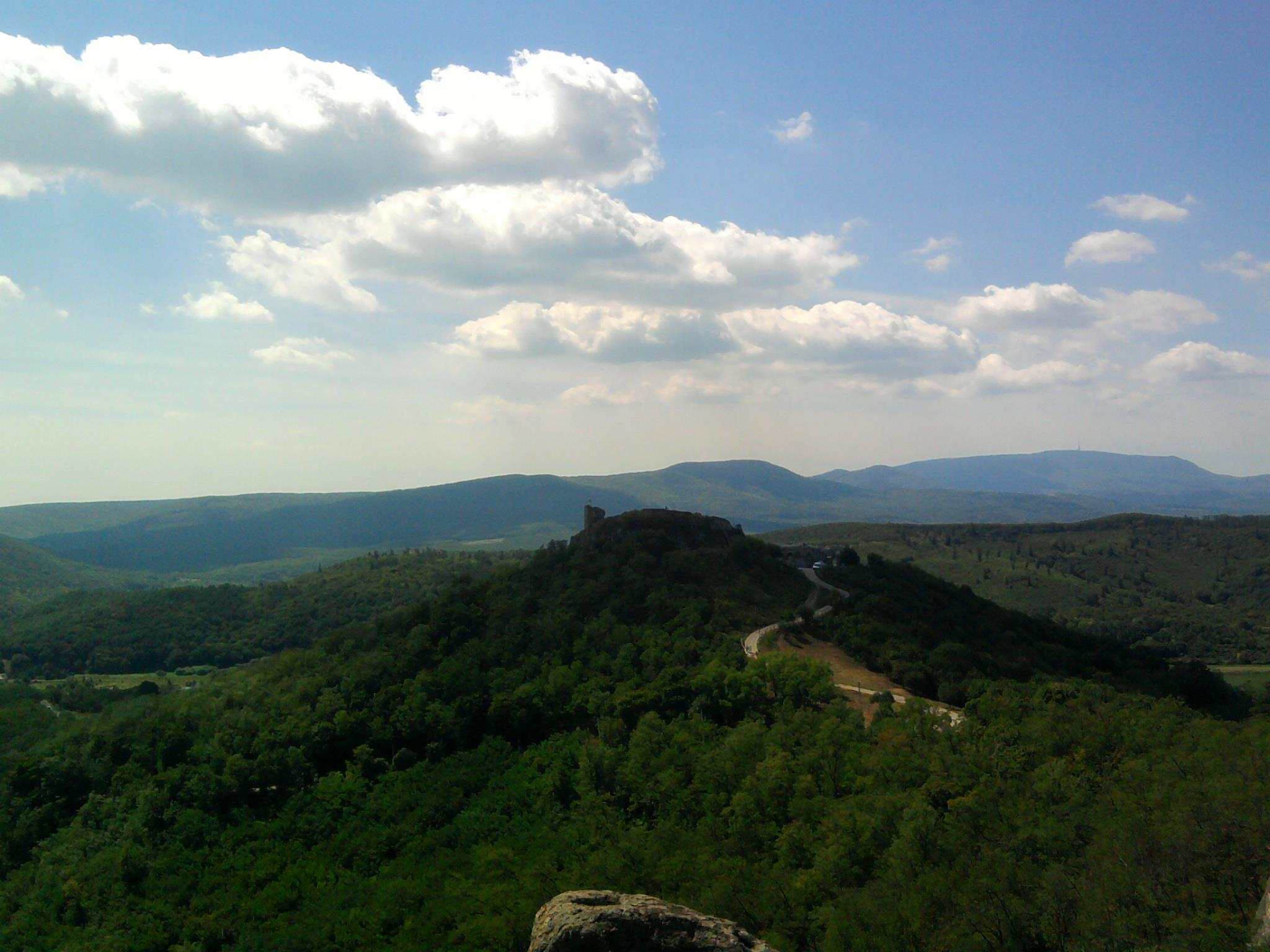 Siroki várrom, Törökasztal felől nézve This is a photo of a monument in Hungary. Identifier: 5838